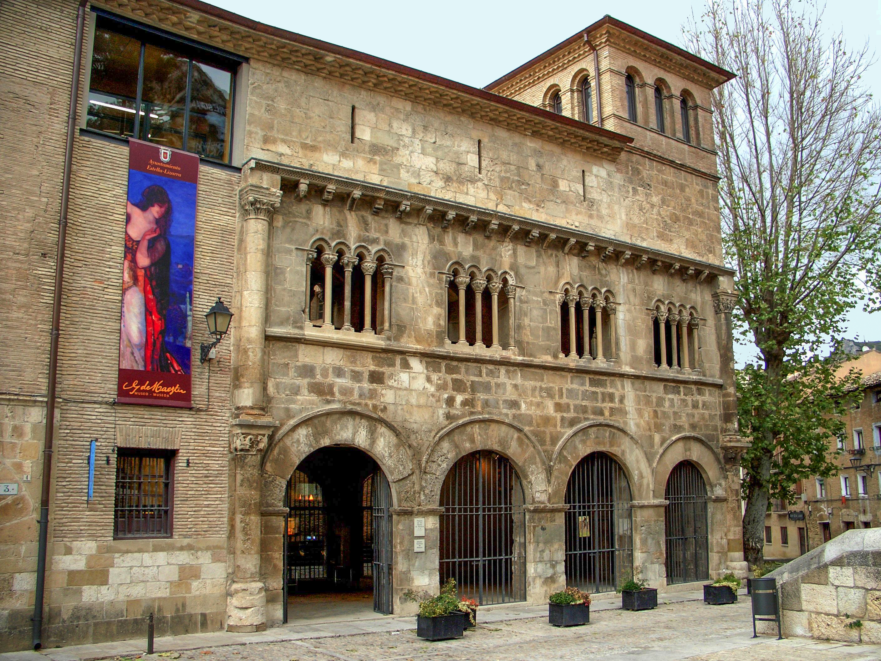 Estella/Lizarra (Navarra, España) - Palacio de los reyes de Navarrra